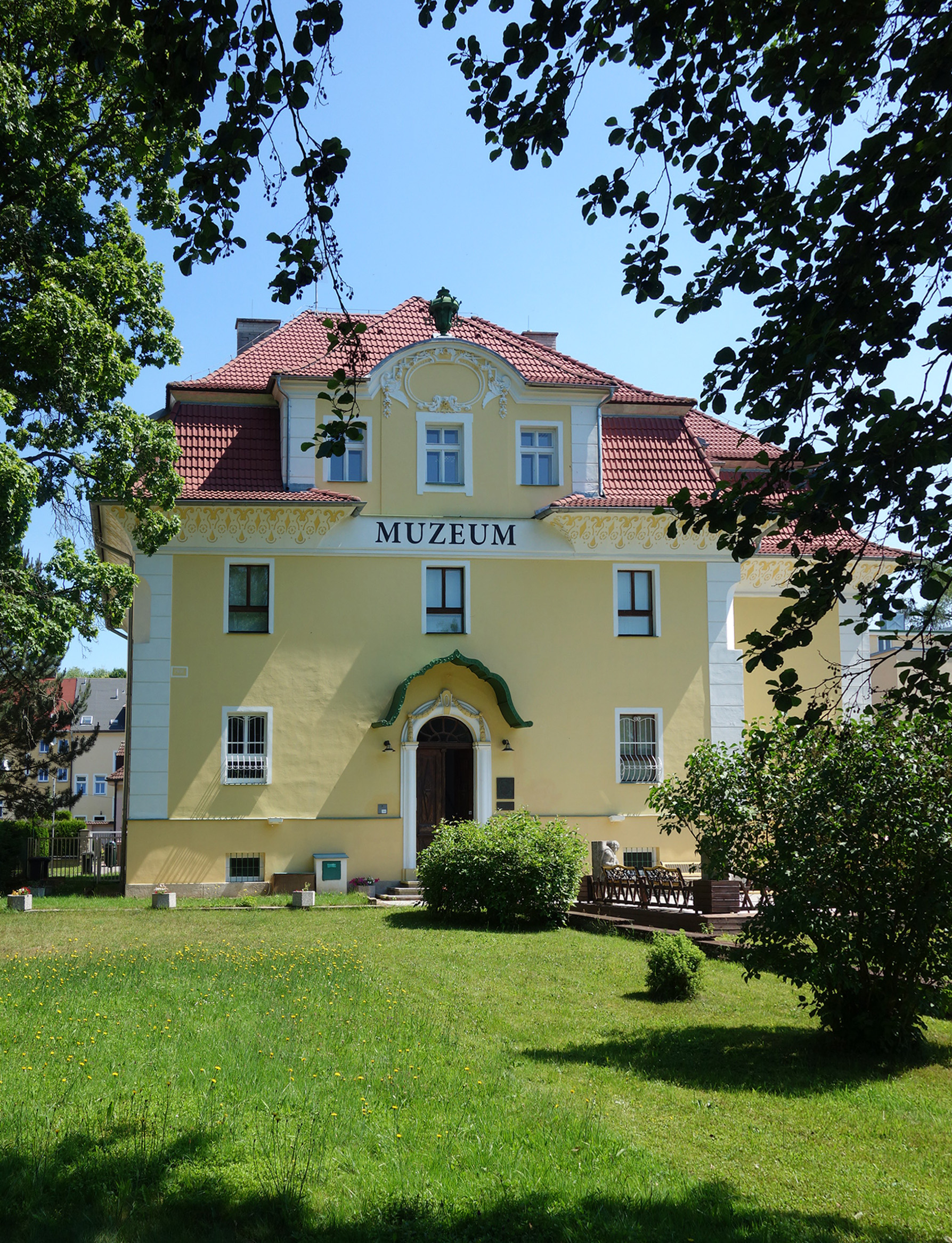 Budova Městského muzea Františkovy Lázně